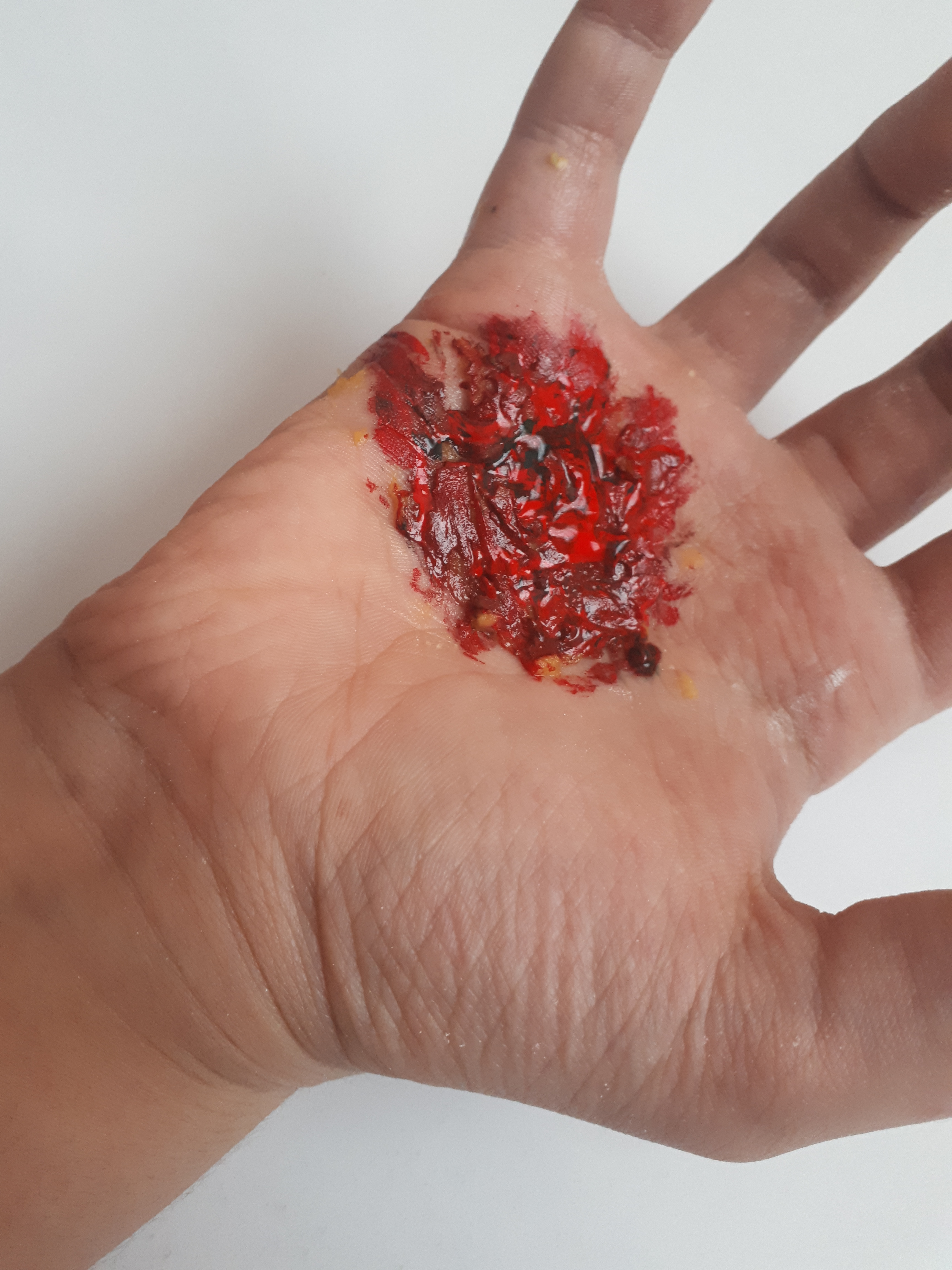 یک مثال گریم برای دست